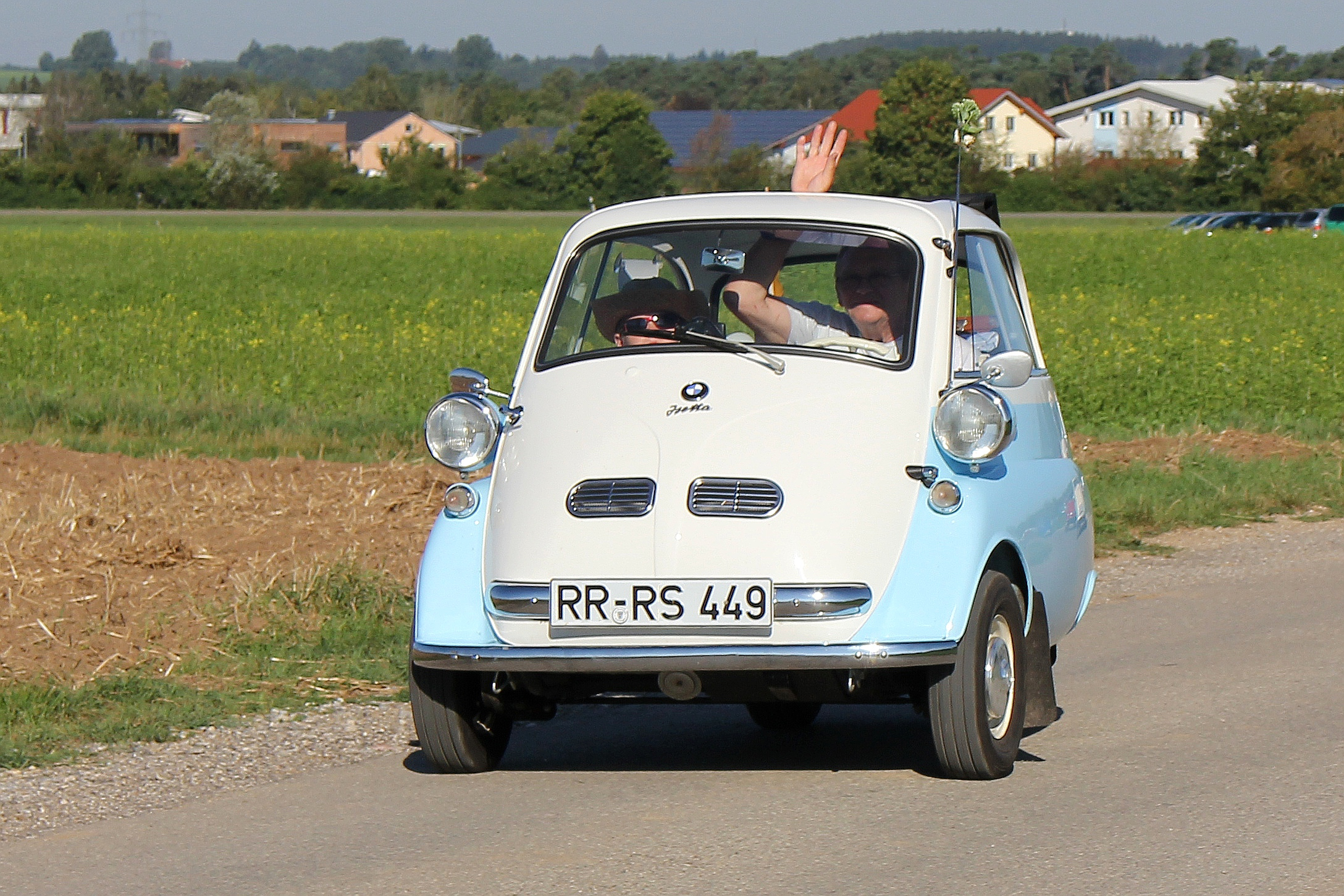 BMW Isetta „Export“ mit Lüftungsklappen (1957), bei der Ausfahrt des Isetta-Treffens in Bad Wörishofen (Kennzeichen des Fahrzeugs verändert)